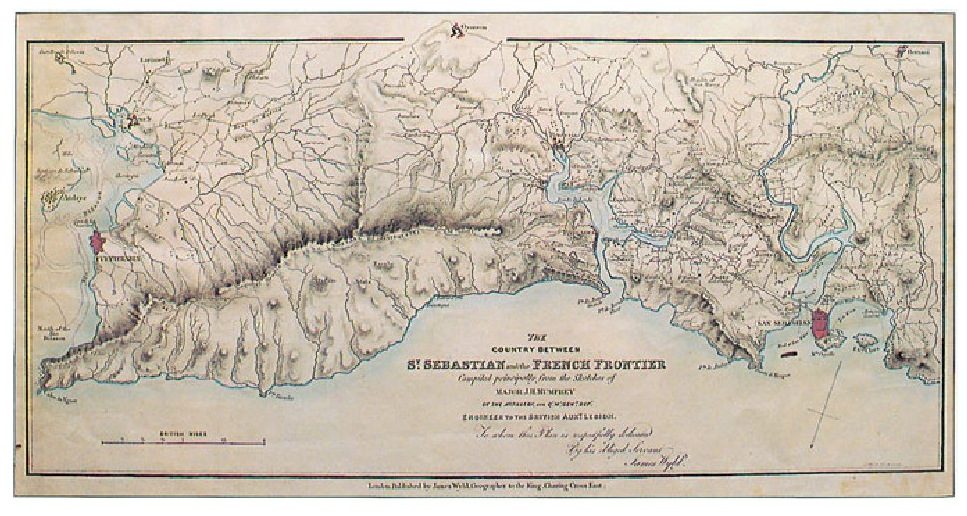 “The country between St. Sebastien and the French frontier”. Major J. H. Humfrey (British Auxiliary Legion). XIX. mendearen hasiera. Garai horretako britainiar kartografia militarraren erakusgarri bikaina. Eskualdeko erliebea fideltasun eta zehaztasun handienaz ematen saiatzen da. (Argazkia: J. G. Bilduma: J. R. S.).